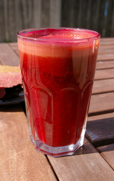 Beet juice